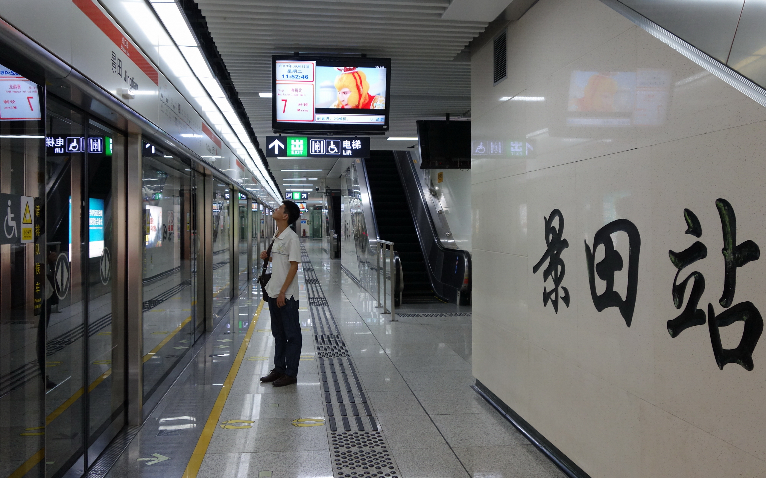 深圳地铁蛇口线景田站站台